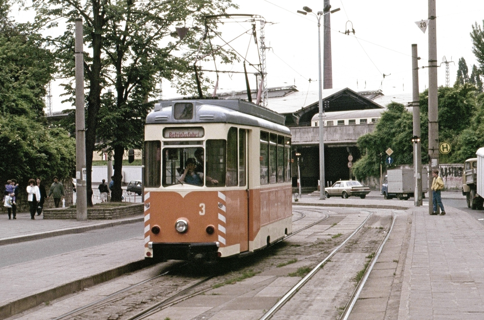 Arbeitstriebwagen Frankfurt (Oder)